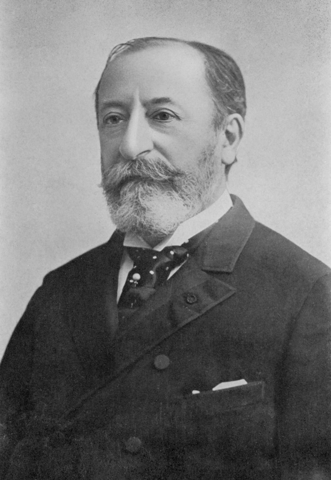 Portrait of Camille Saint-Saëns (1835-1921). Ilustraciones libro de Memorias Saint-Saëns, 1919